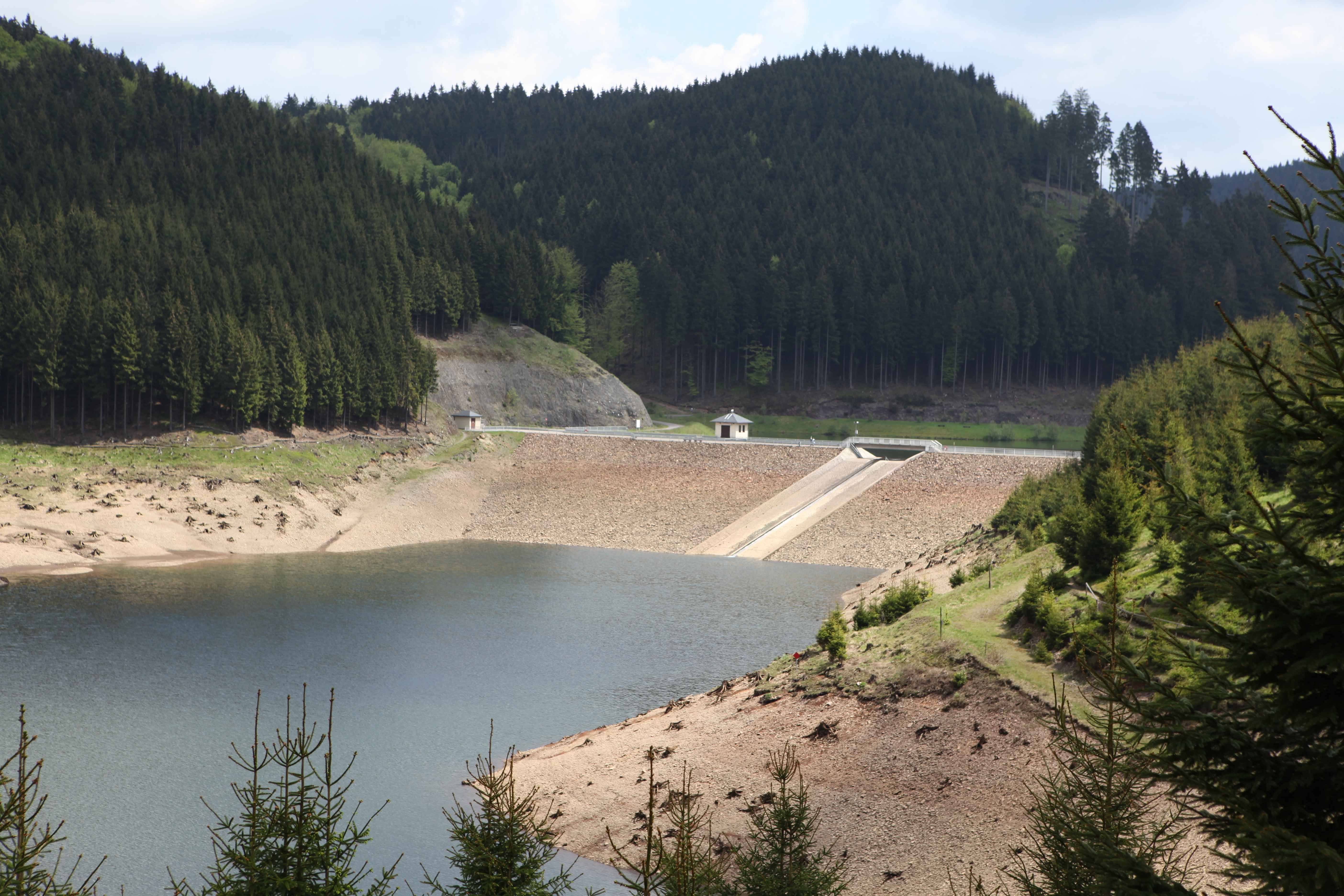 Gräftiegelsperre zwischen Goldisthal und Scheibe im Thüringer Wald, Landkreis Sonneberg